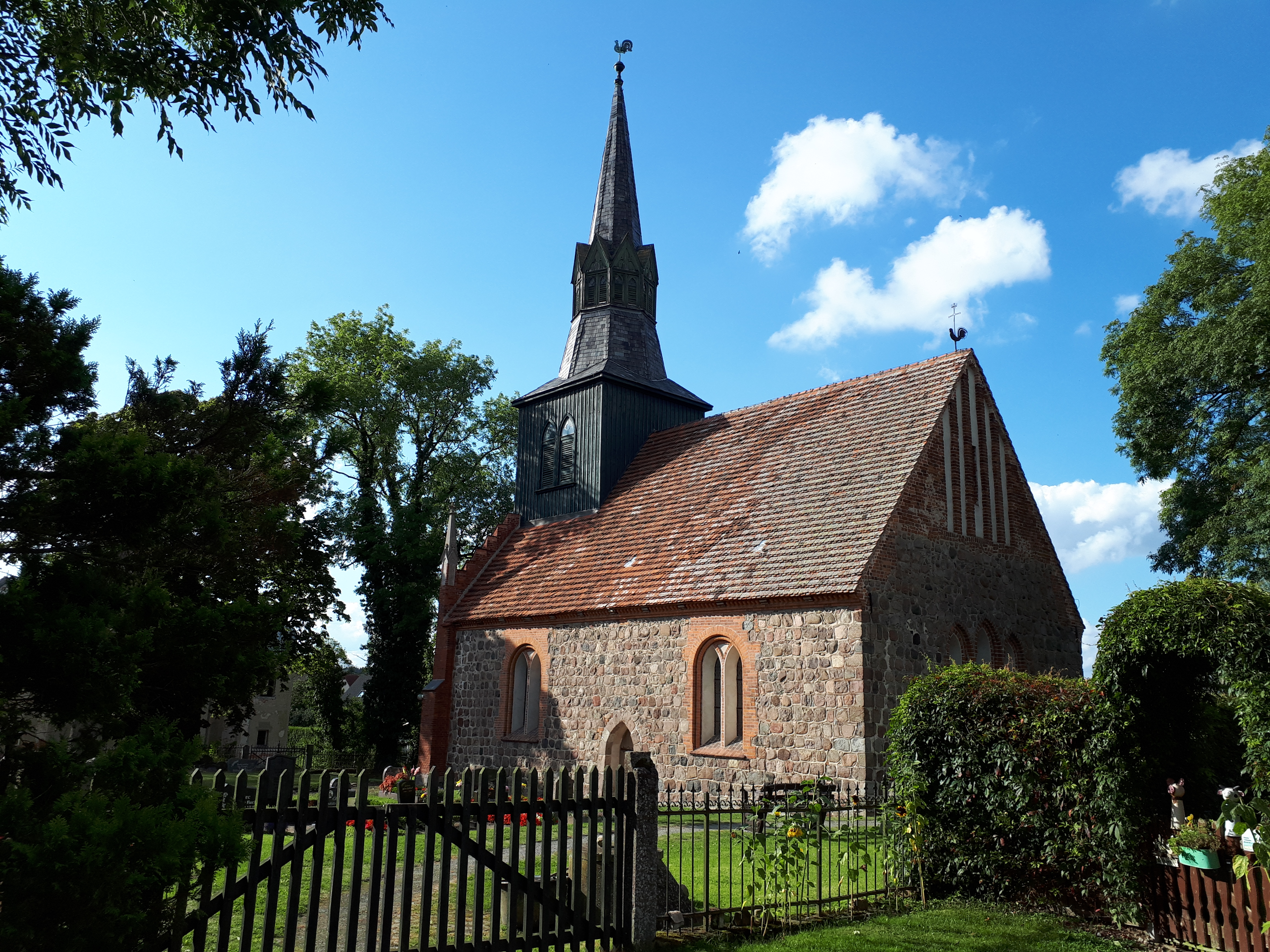 Auf den Bild sieht man die Dorfkirche in Blankenhof OT Chemnitz vom oberen Friedhofstor aus